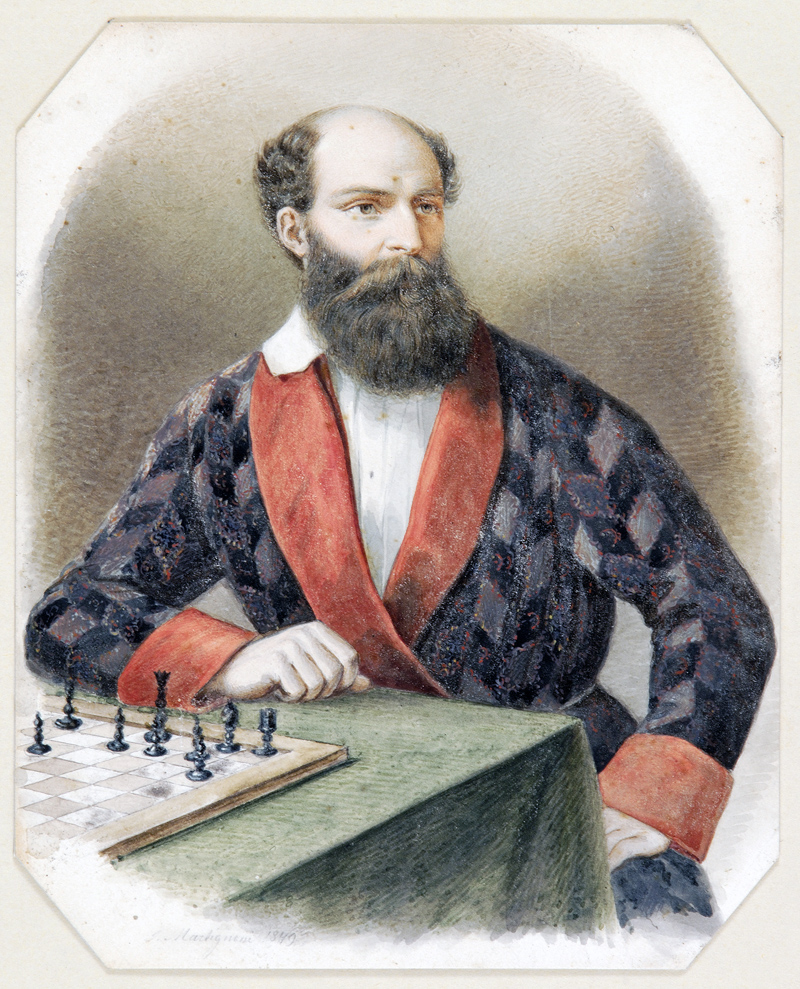 Batthyány Lajos házikabátban, sakkozás közben (vízfestmény)